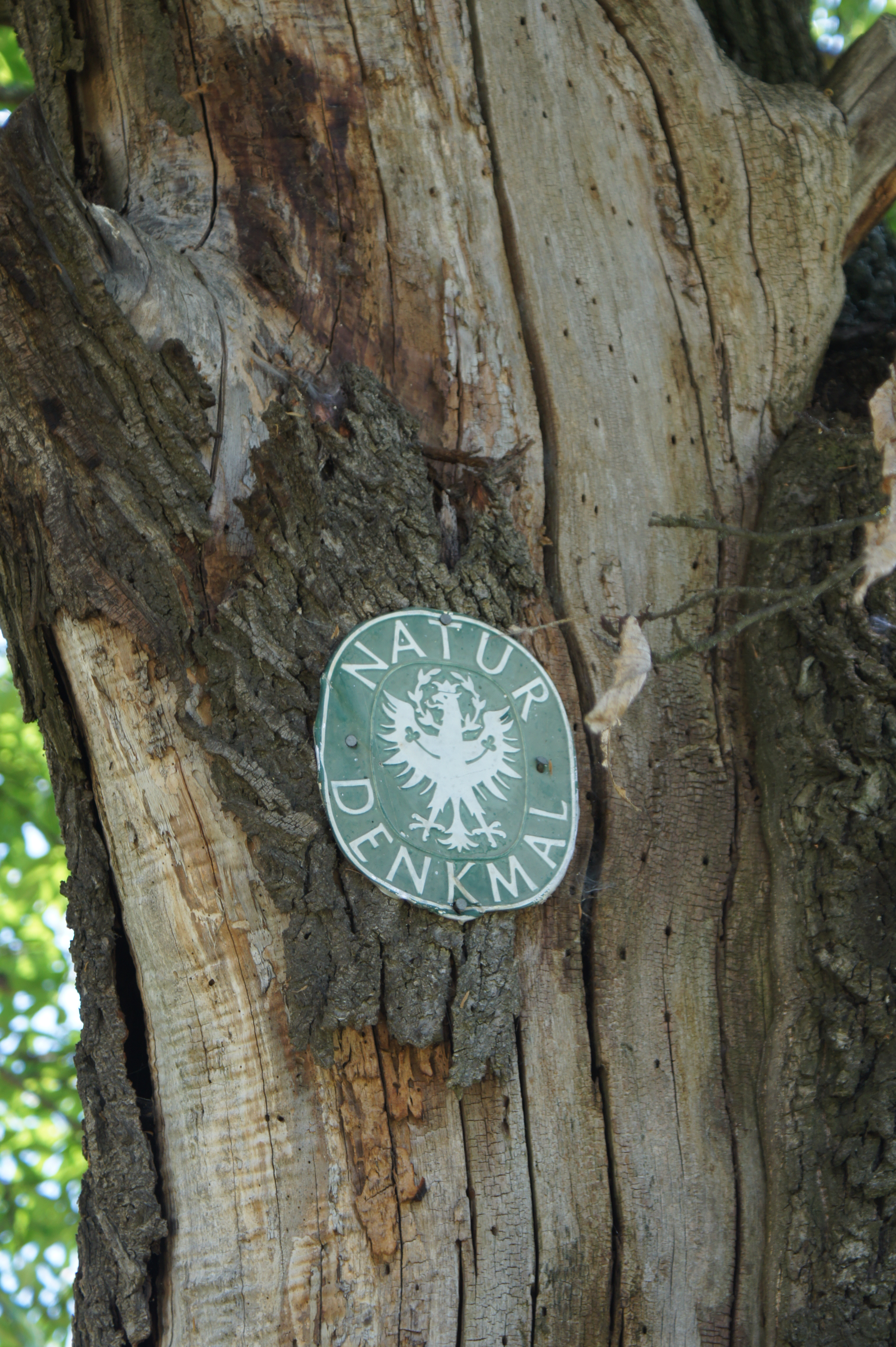 Edelkastanie nordwestlich von Karrösten This media shows the natural monument in the Tyrol with the ID ND_2_11.